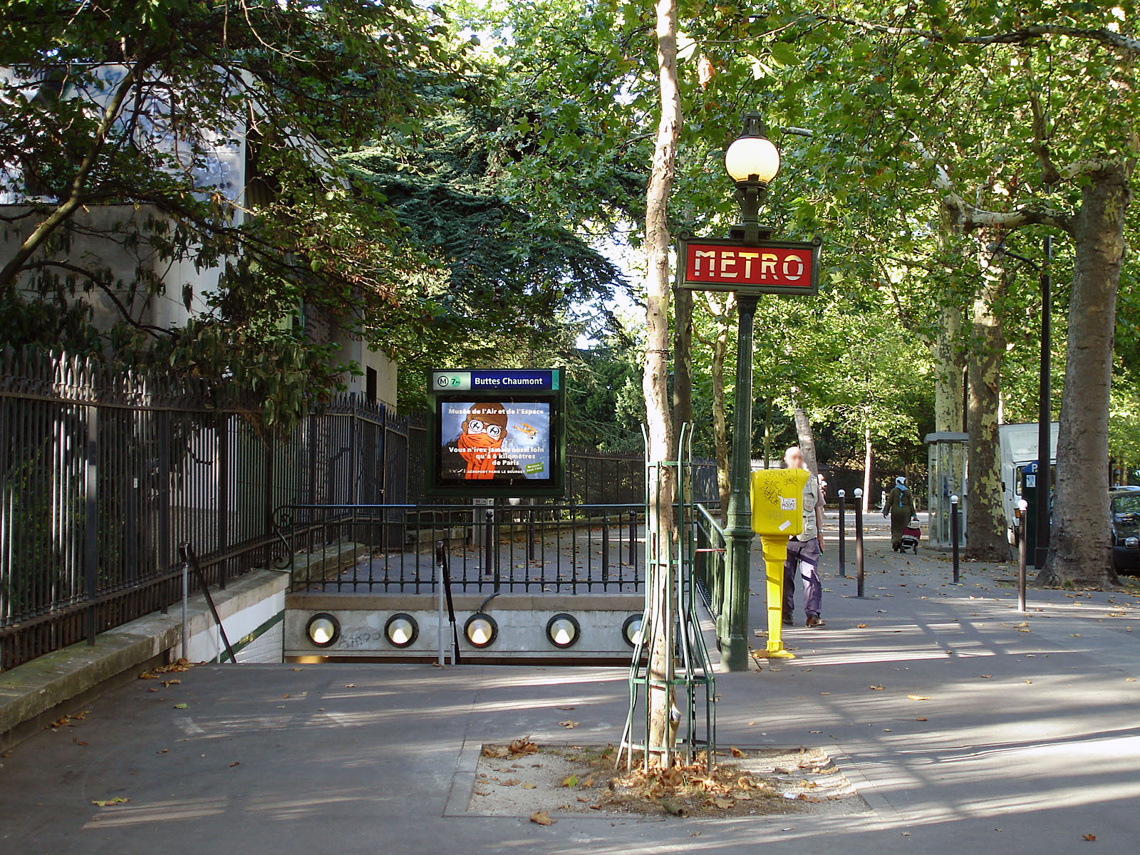 Station Buttes-Chaumont de la ligne 7 bis du métro de Paris, France.